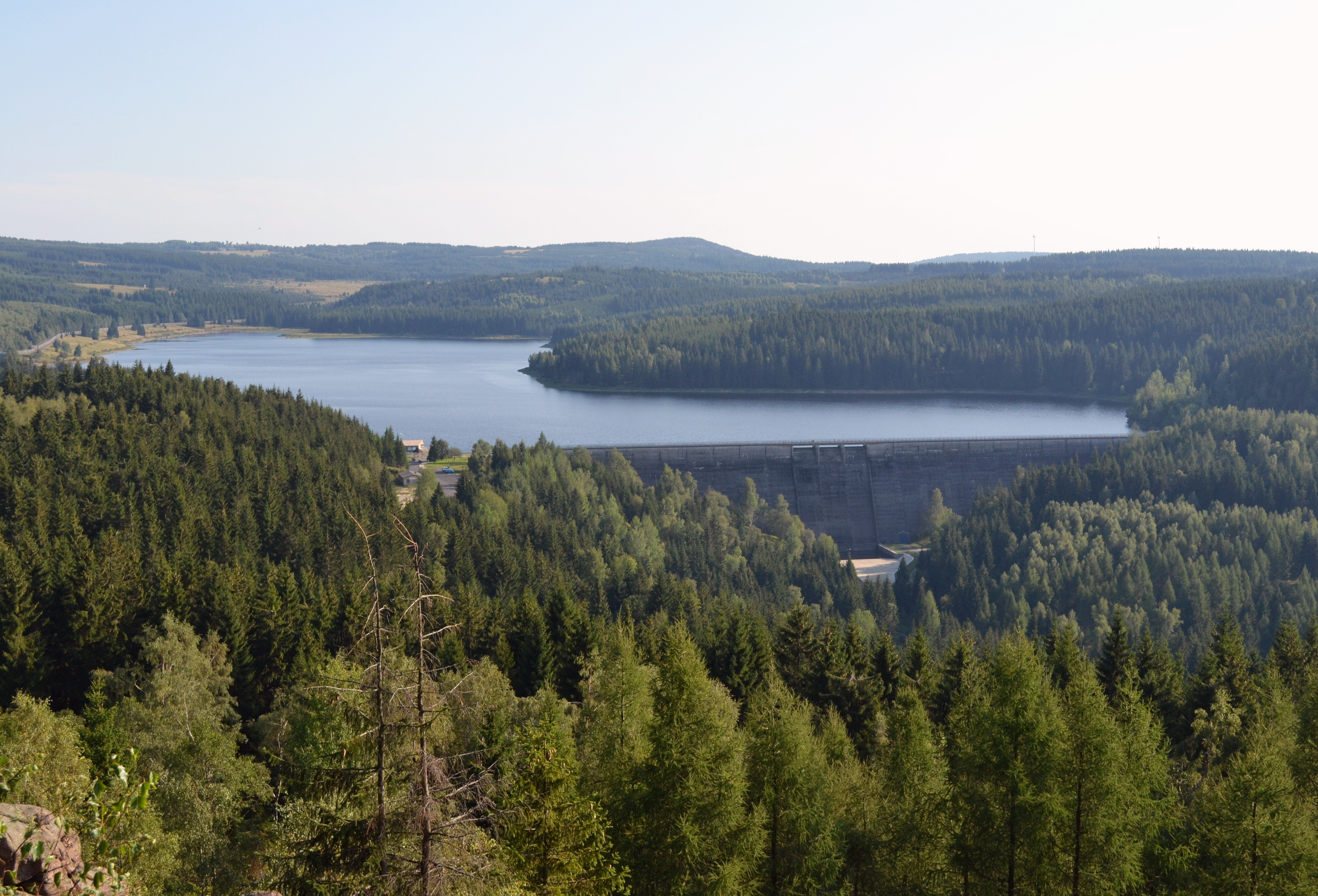 Fláje (Český Jiřetín) - Flájská přehrada, pohled z Puklé skály